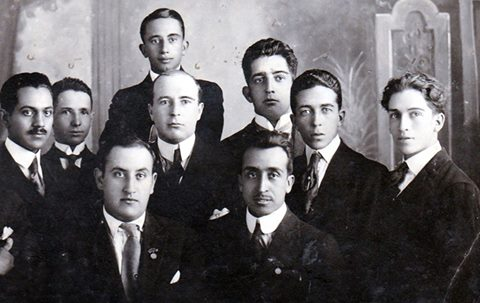 Miembros de la Generación del 20.